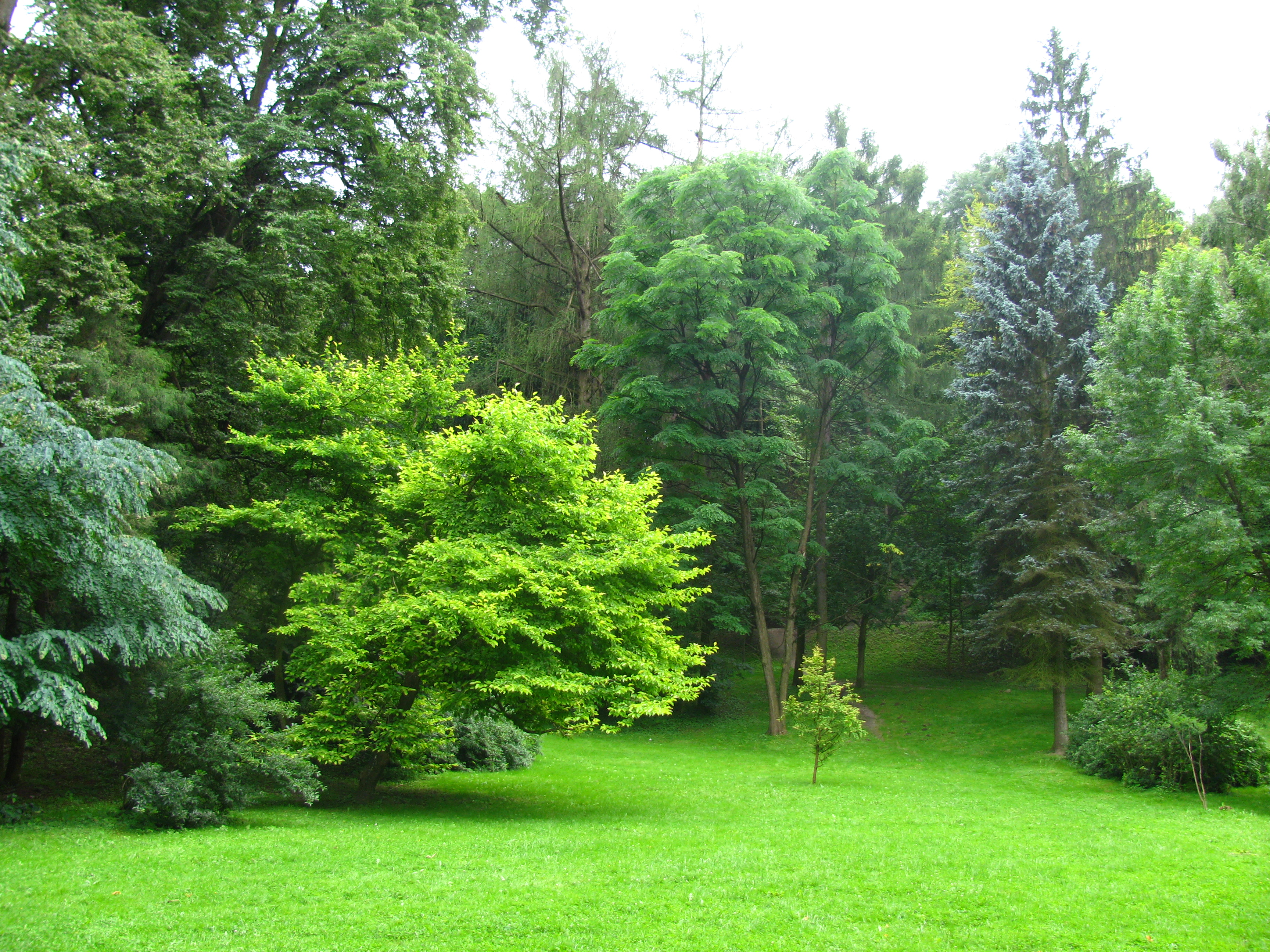 Стрийський парк у Львові.jpg: дерева у нижній частині Стрийського парку у Львові